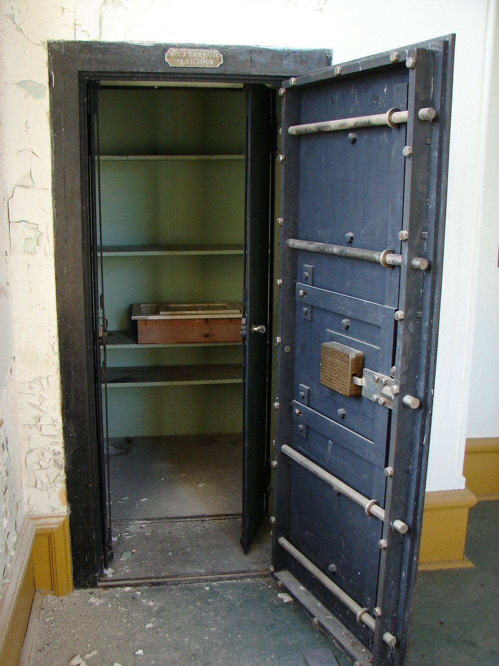 Small bank vault or strongroom from 1901.